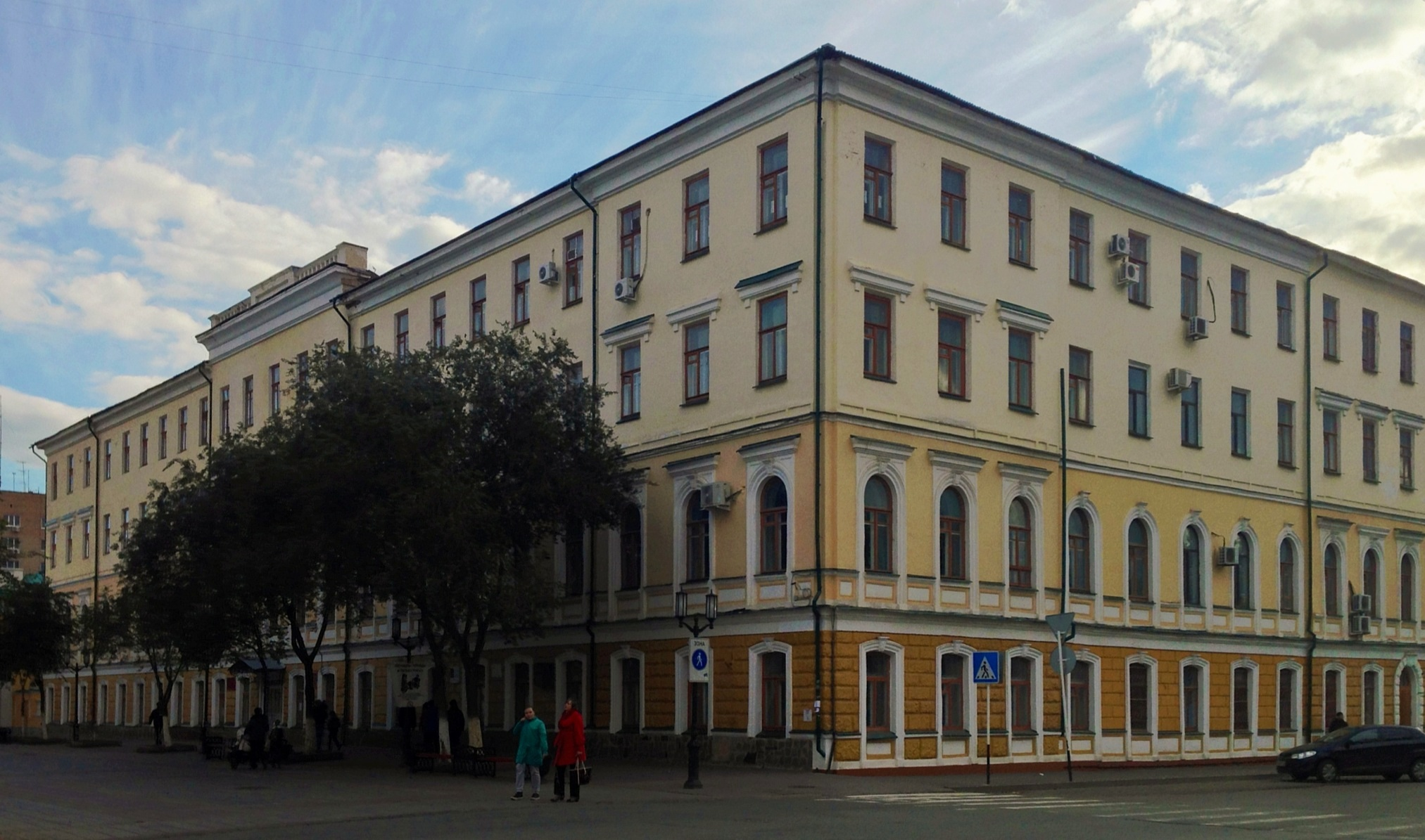 Гимназия мужская (Оренбургская область, Оренбург, Советская улица, 19, Правды улица, 5, Каширина улица, 18)